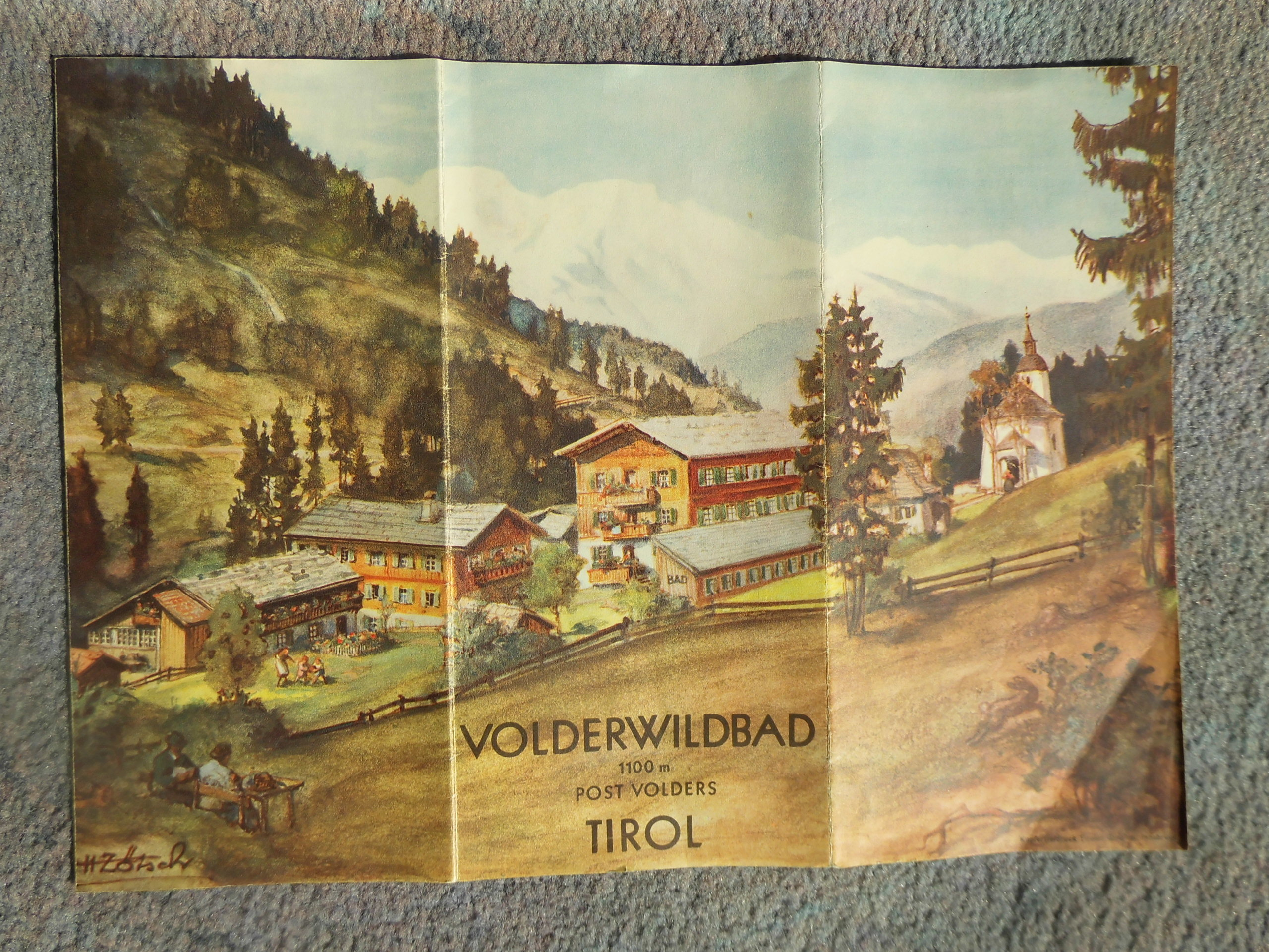 Das Foto zeigt den von Dr. Josef Fink in den 1950er Jahren erstellten Hausprospekt zum ,,Alpengasthof, Bad und Pension" Volderwildbad mit einem Bild von Hans Zötsch (1886-1957).